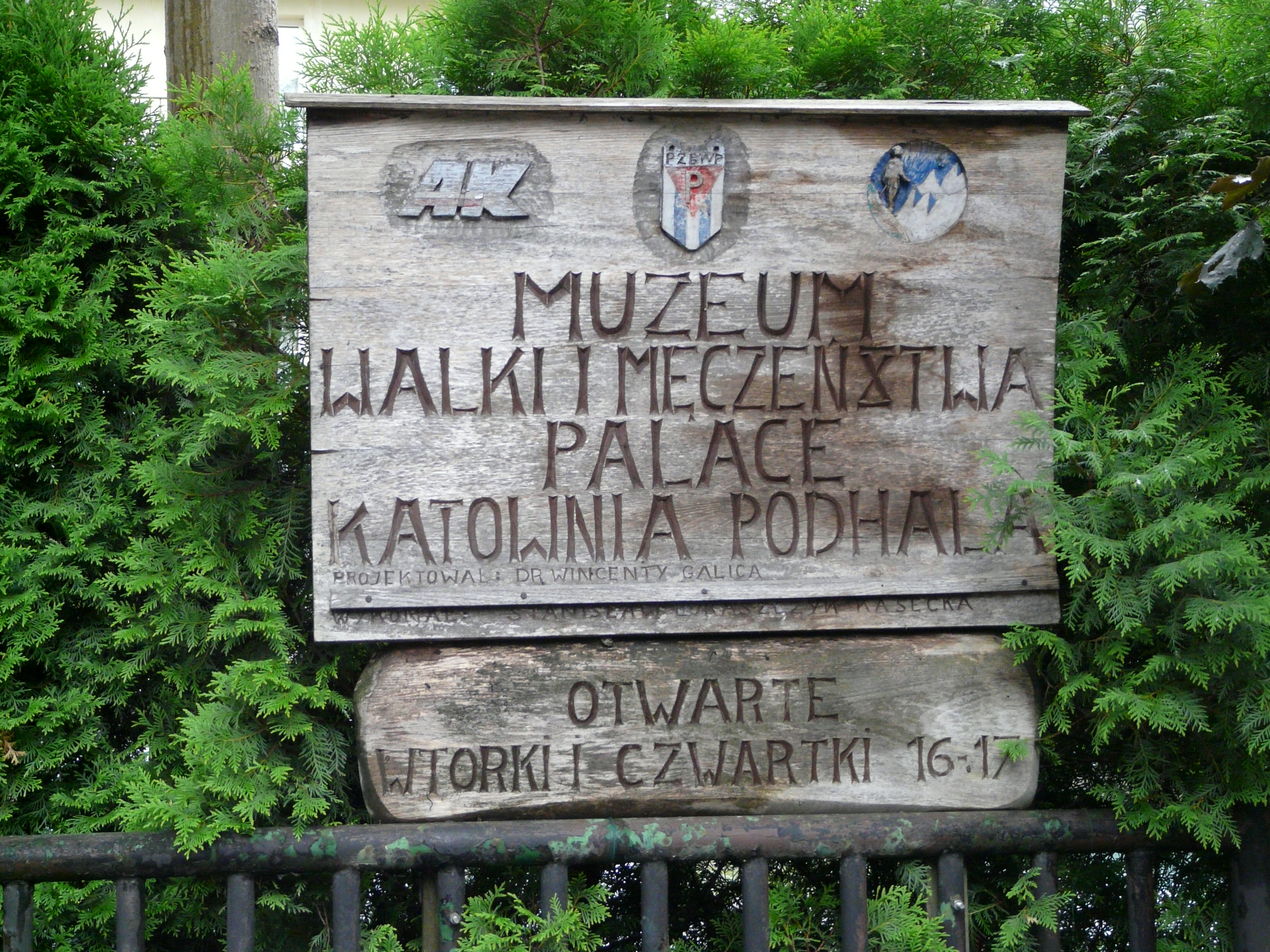 Zakopane